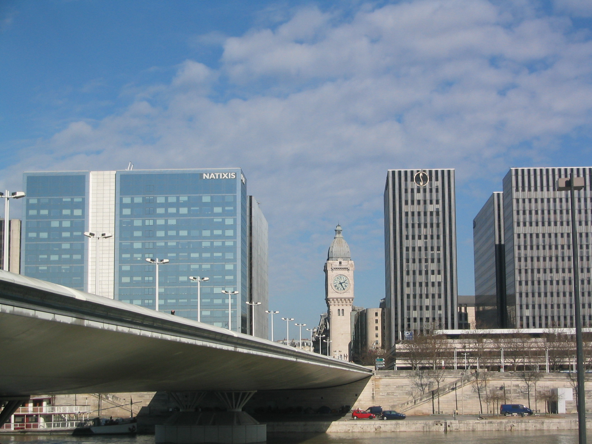 Natixis, la gare de Lyon et le pont Charles de Gaulle à Paris (12e), quai de la Rapée